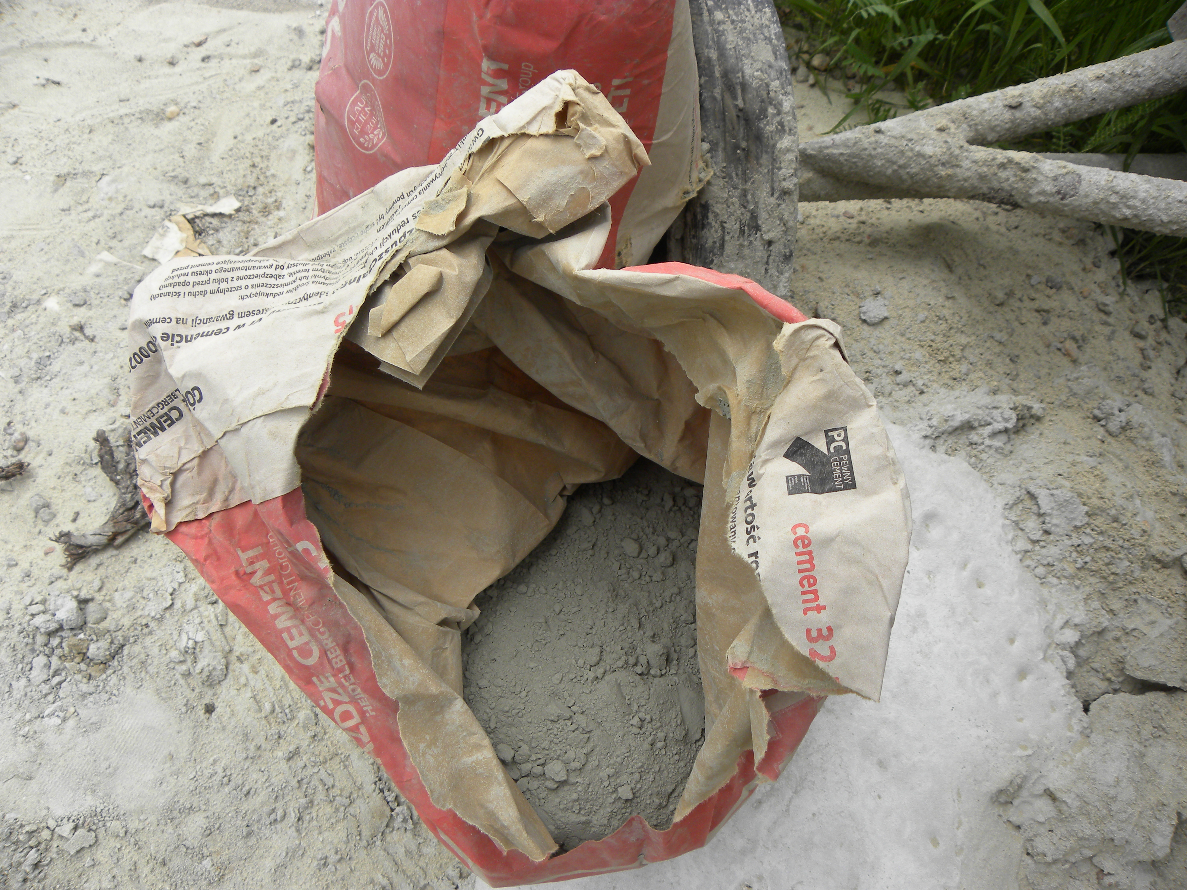 Worki z cementem English | Polski | +/−